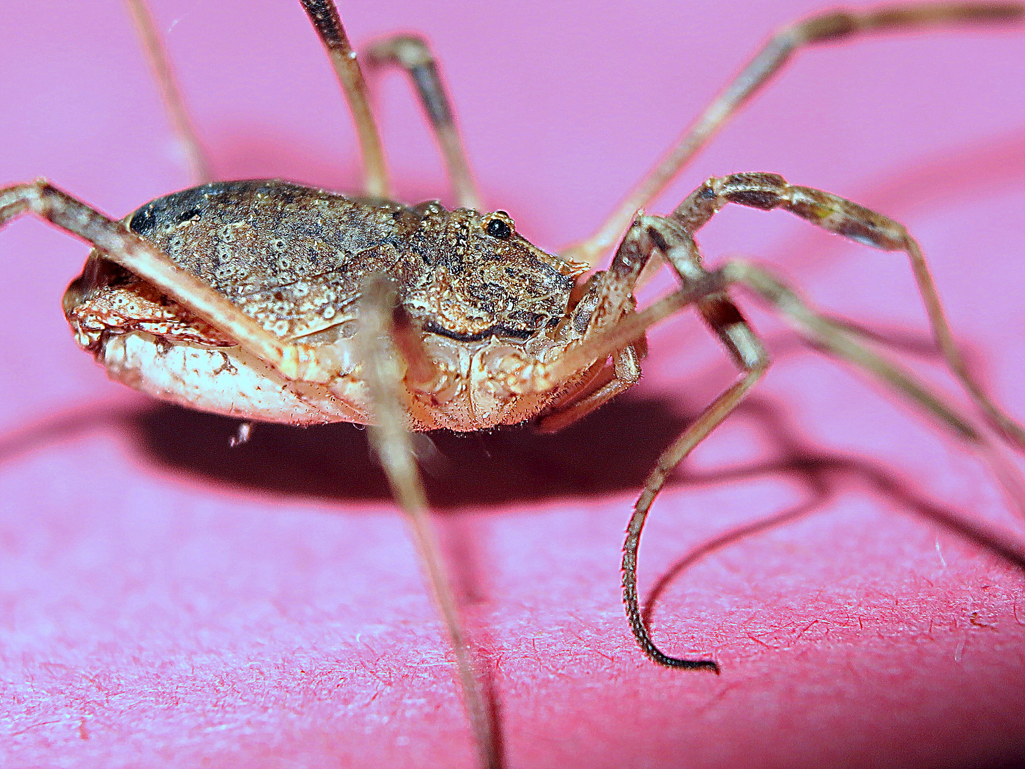 Pink Spider